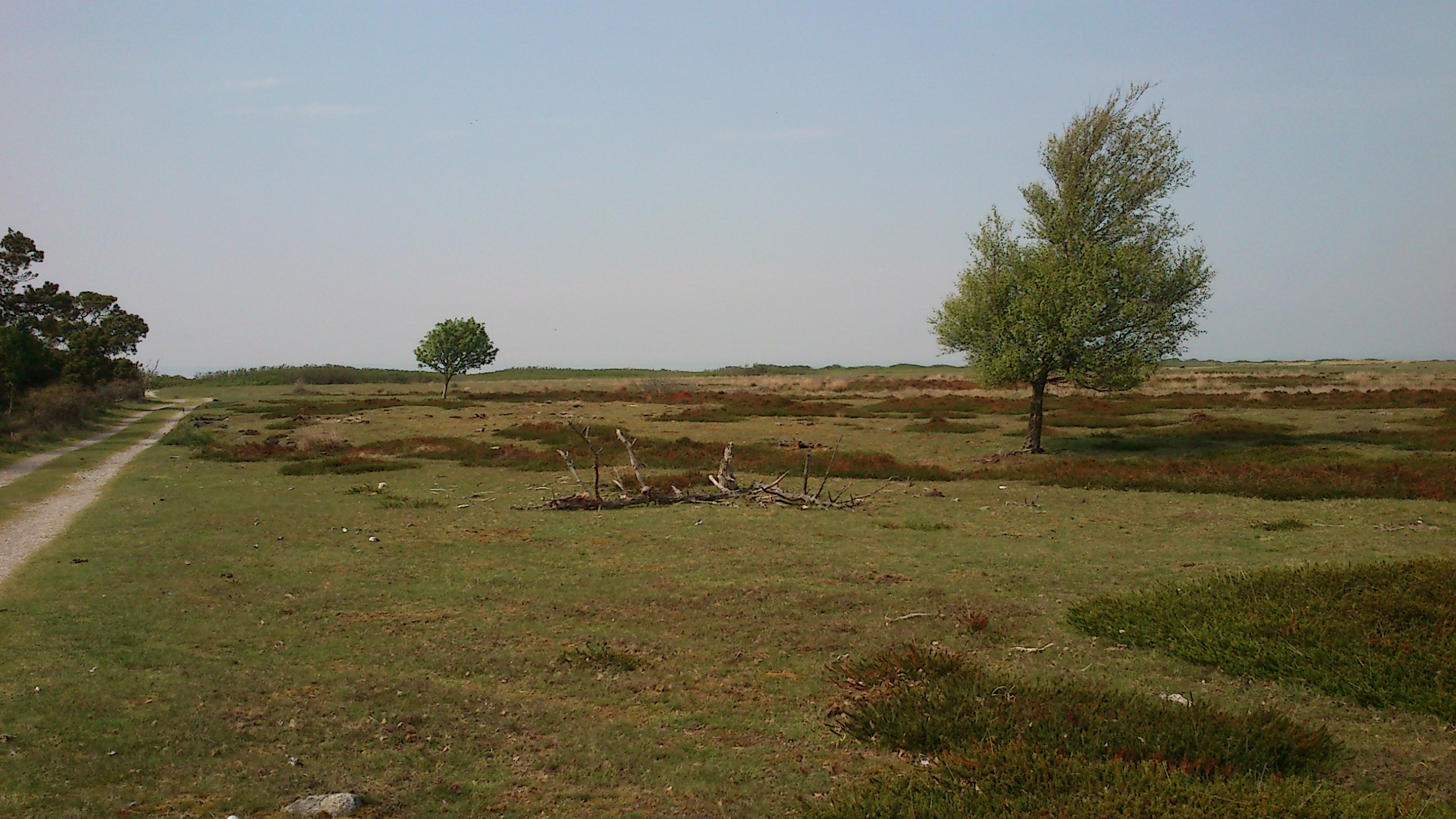 Strangengen på Øvre.